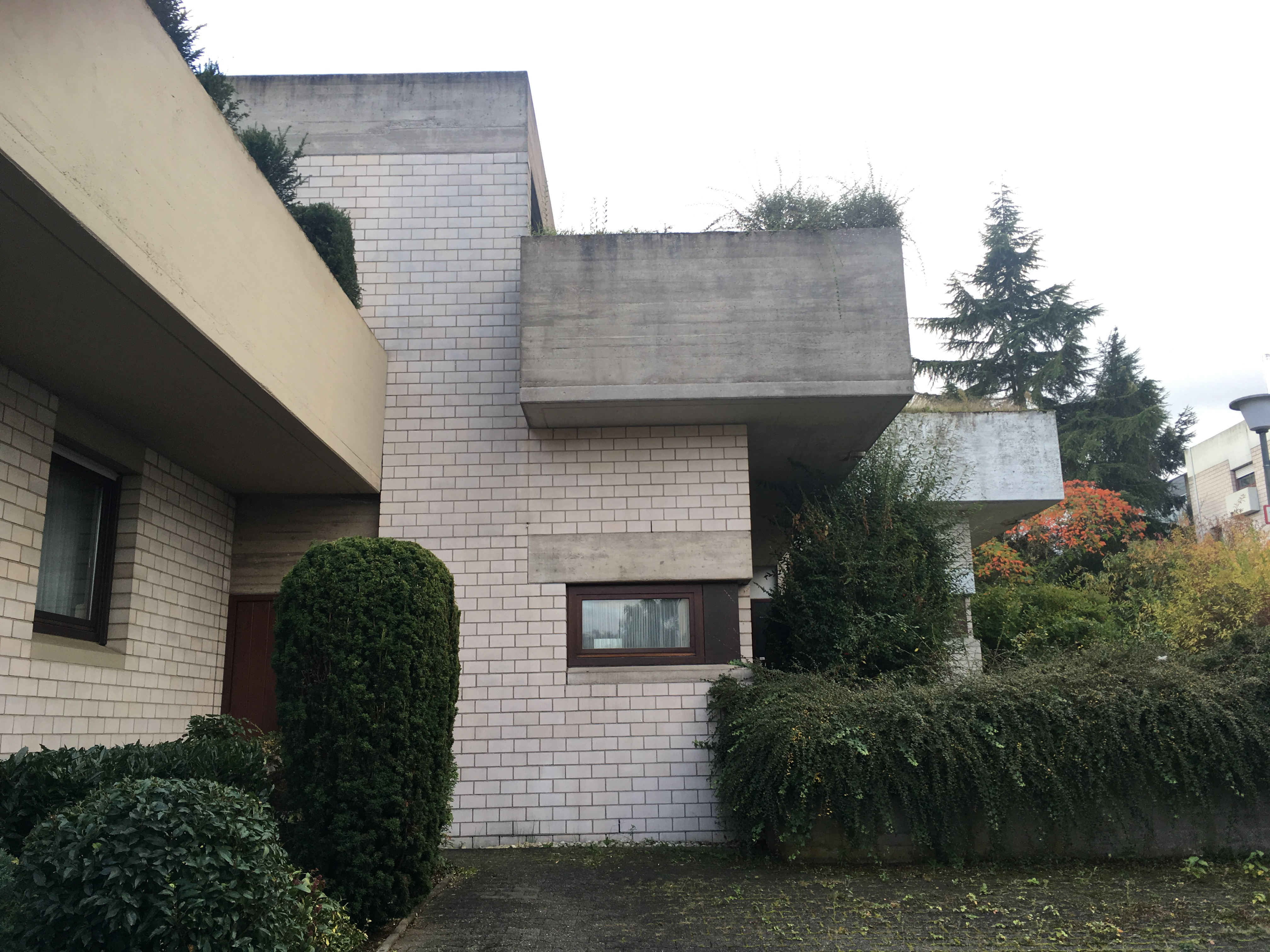 Wohnsiedlung "Auf der Hill" von Prof. Günter Kleinjoahnn